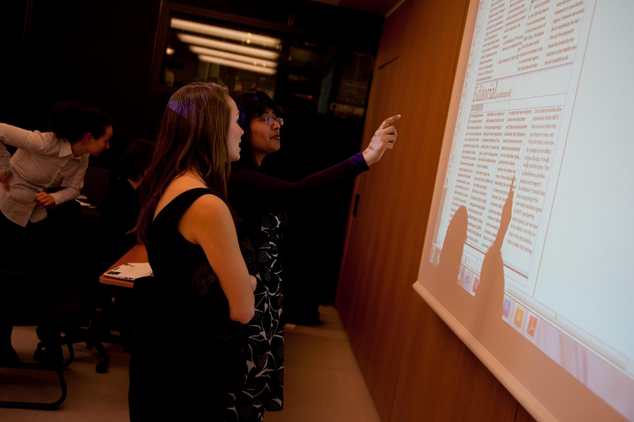 MEU: tłumacze